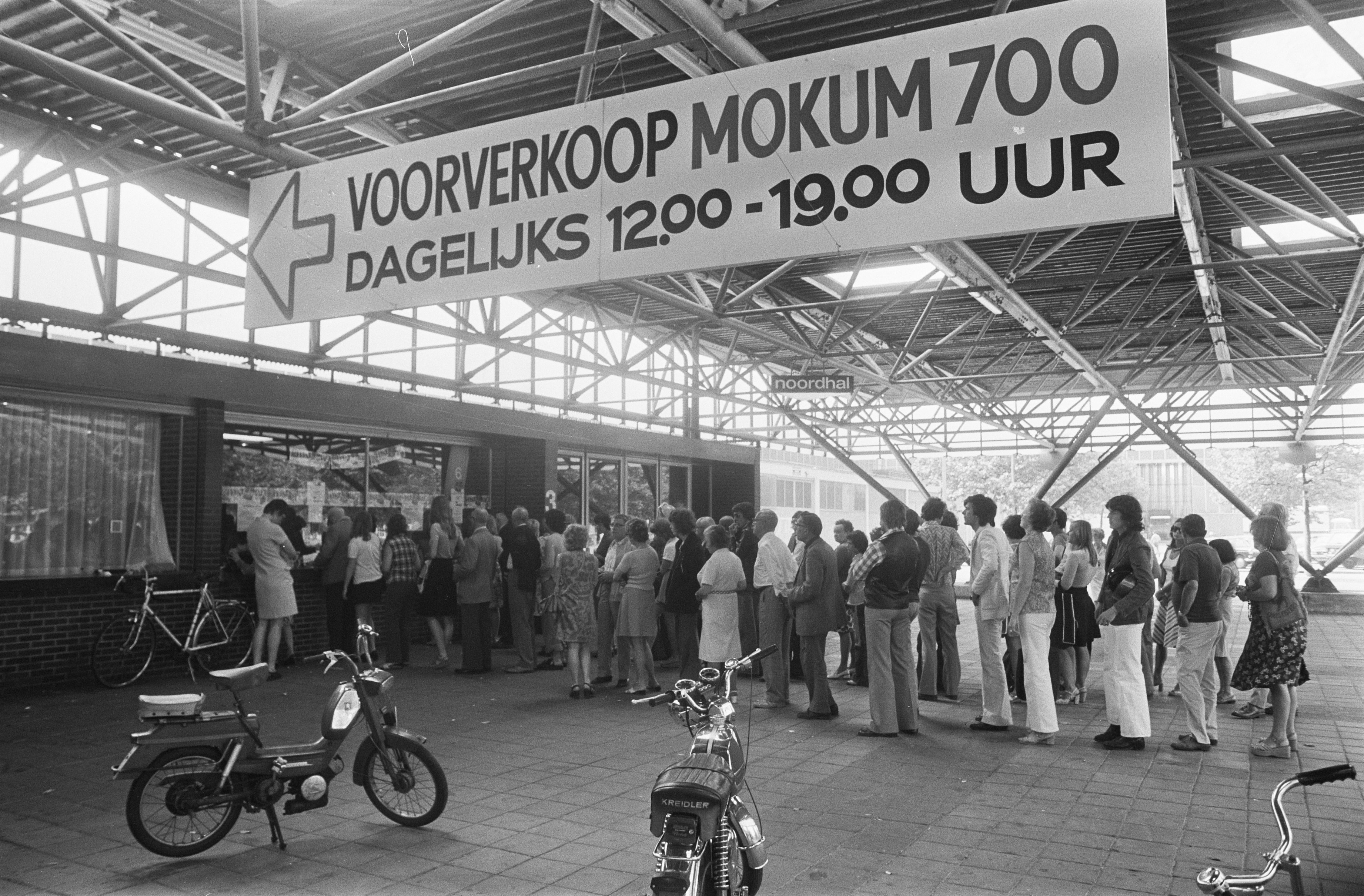 Collectie / Archief : Fotocollectie Anefo Reportage / Serie : Voorbereidingen voor de Mokum 700-manifestatie in de RAI in Amsterdam Beschrijving : Lange rij bij de kaartverkoop Datum : 23 juni 1975 Locatie : Amsterdam, Noord-Holland Trefwoorden : manifestaties Fotograaf : Fotograaf Onbekend / Anefo Auteursrechthebbende : Nationaal Archief Materiaalsoort : Negatief (zwart/wit) Nummer archiefinventaris : bekijk toegang 2.24.01.05 Bestanddeelnummer : 928-0087